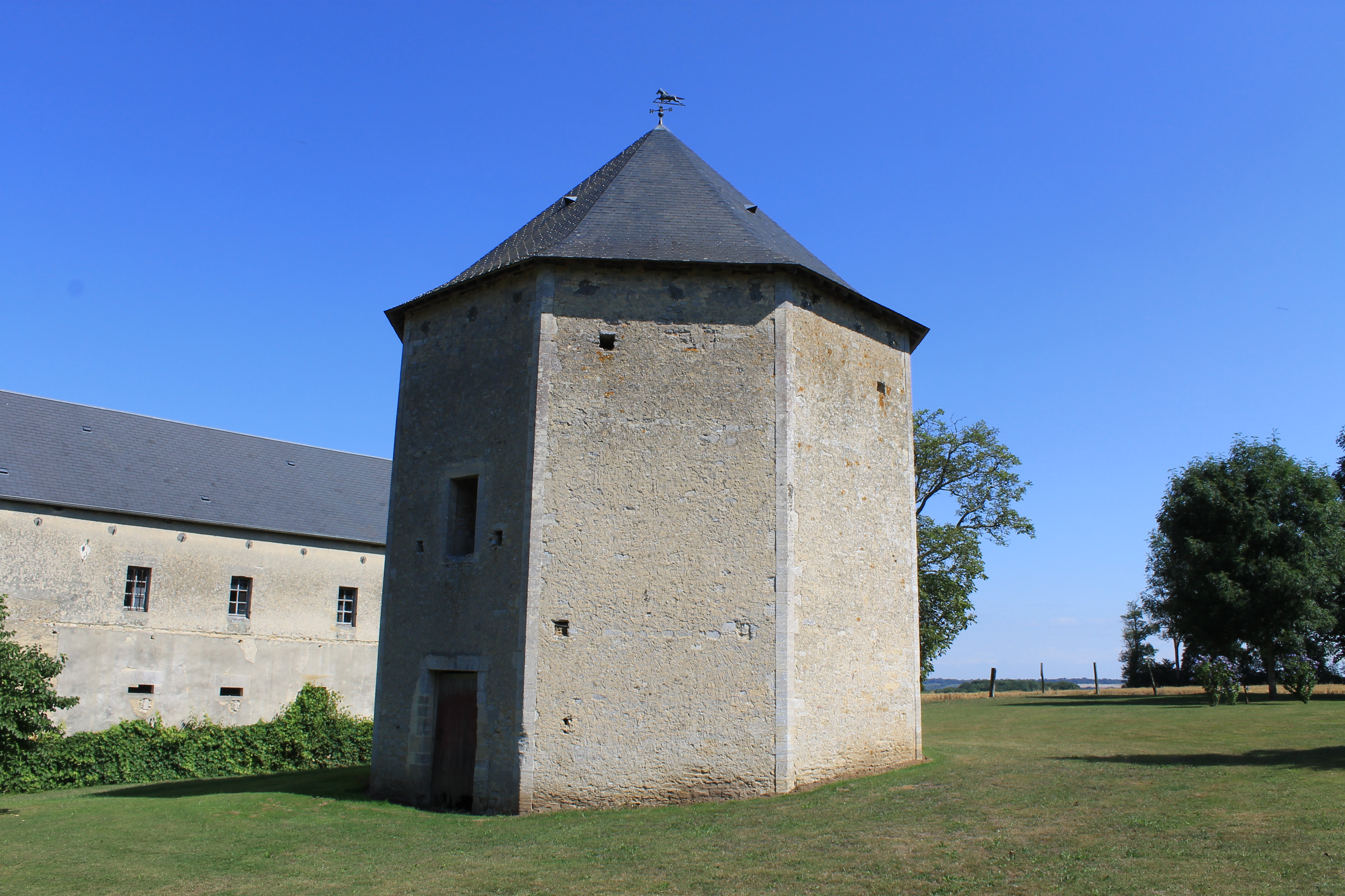 Colombier hexagonal du XVIIIe de la Ferme du Mesnil à Magny-en-Bessin (Calvados)